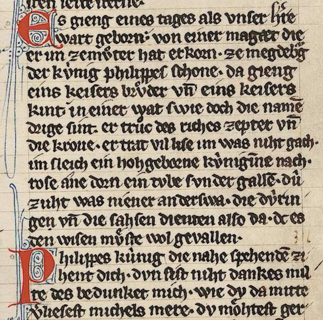 Der II. Spruch aus dem 1. Philippston Walthers von der Vogelweide: „Magdeburger Weihnacht“ (L 19,5) im Codex Manesse, Bl. 137r